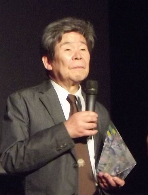 Isao Takahata au Festival international du film d'animation d'Annecy 2014